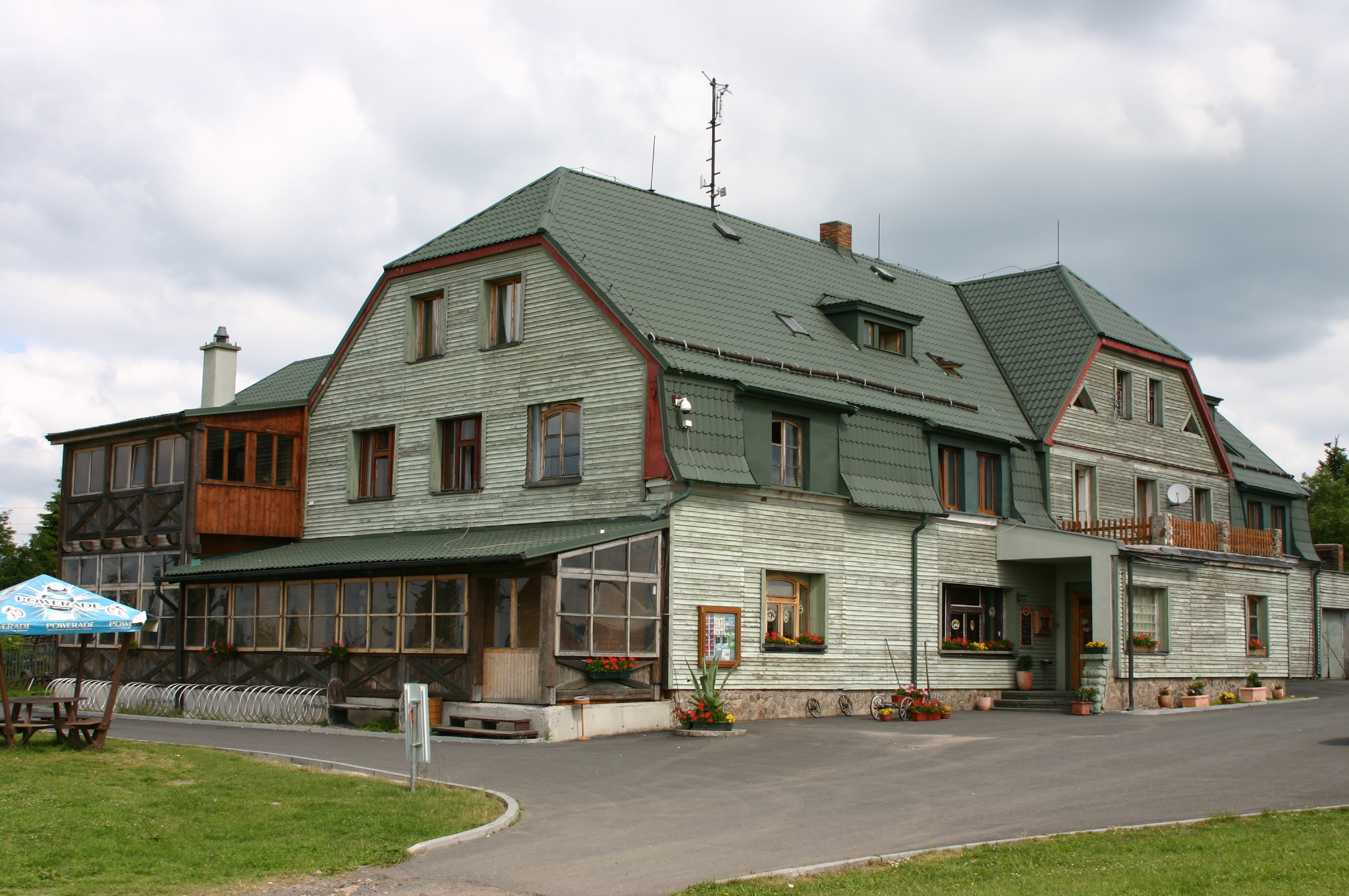 Česky: Hotel v Lesné (Nová Ves v Horách)